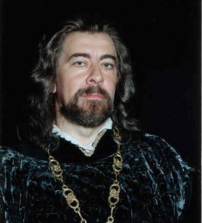 Cantante italiano, basso